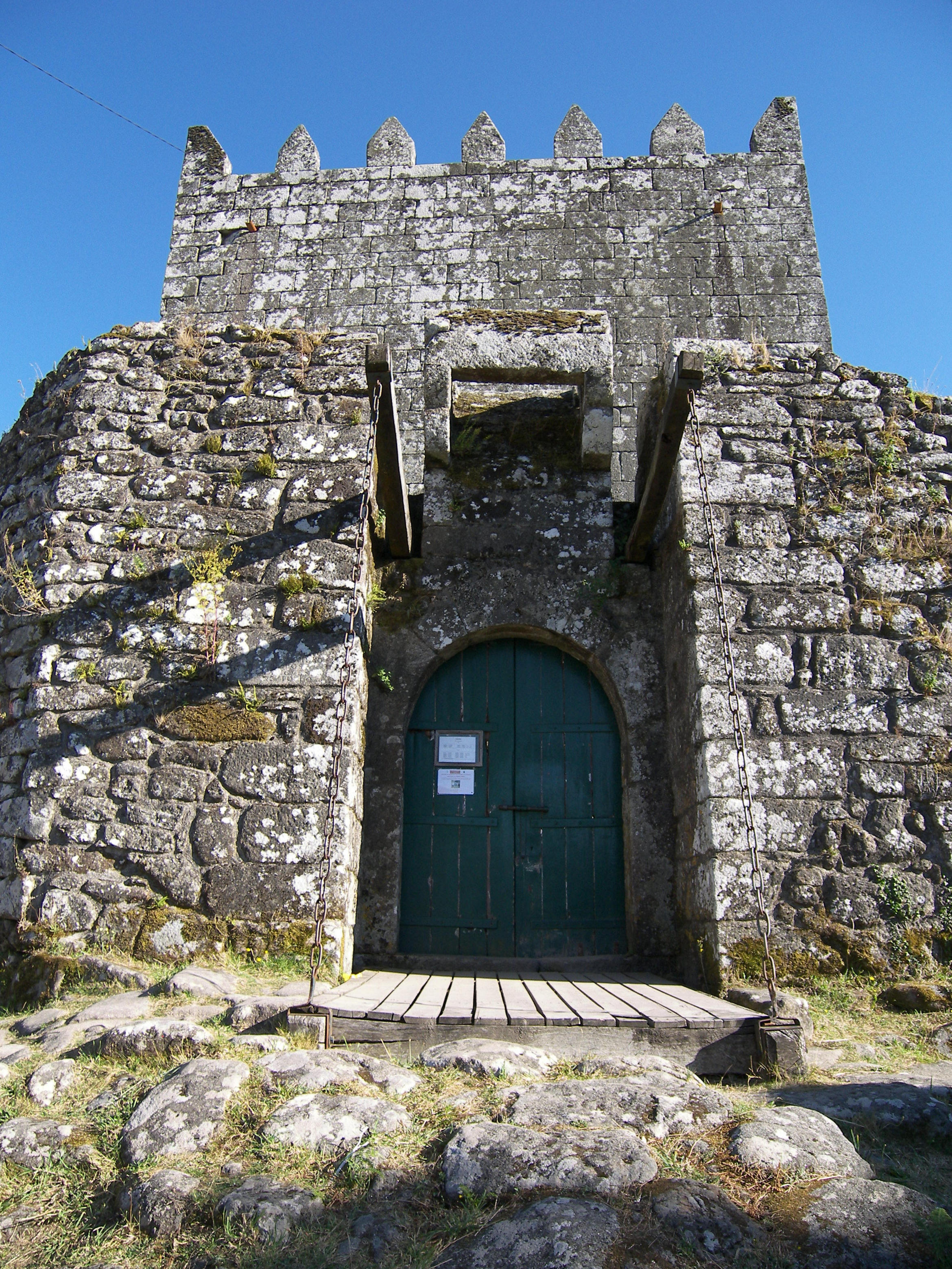 Tor mit Zugbrücke zum Castelo do Lindoso, with drawbridge and Machicolation